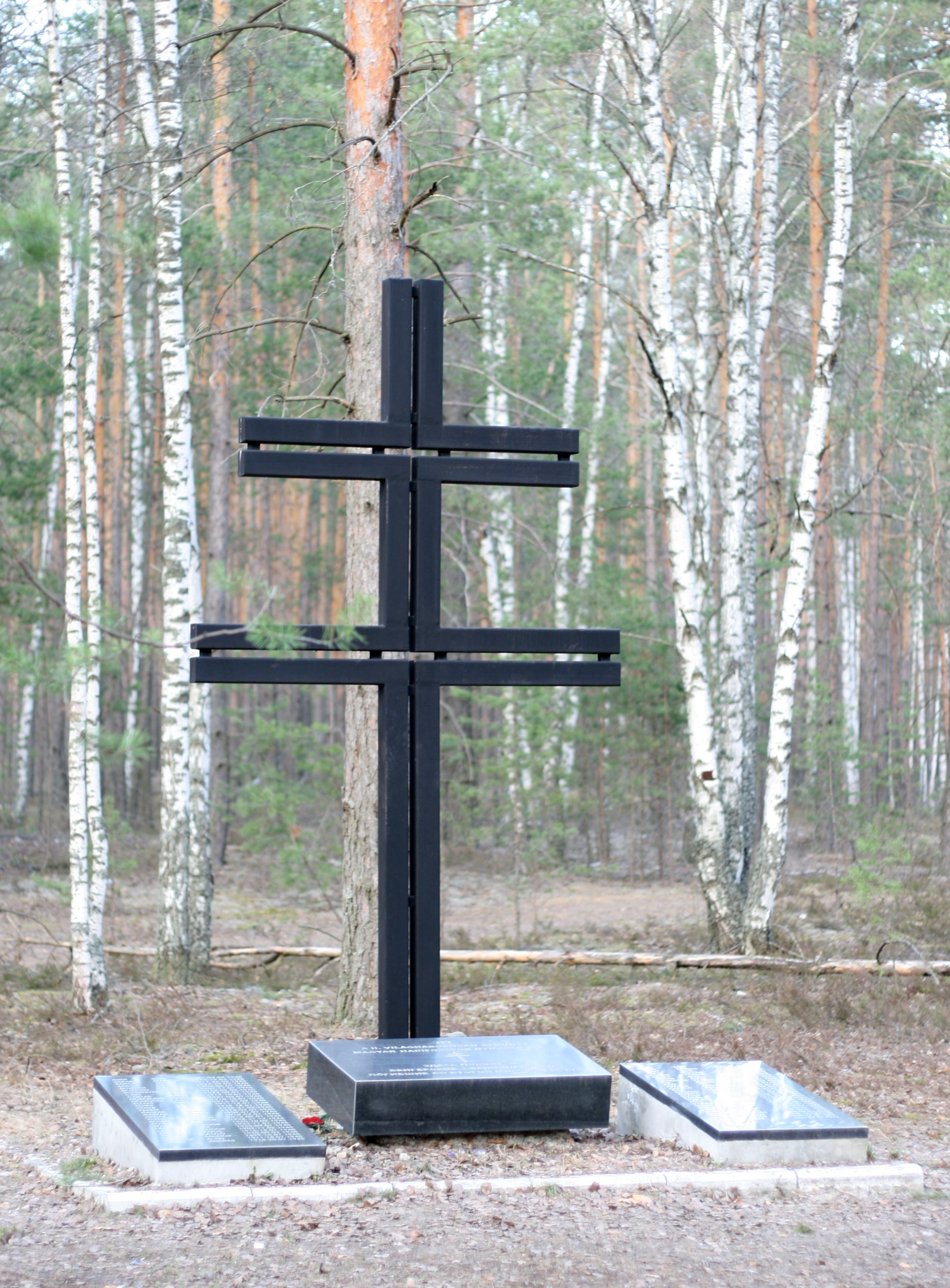 Памятник венгерским военнопленным, погибшим во Второй мировой войне при разработке торфяников близ Пыры.